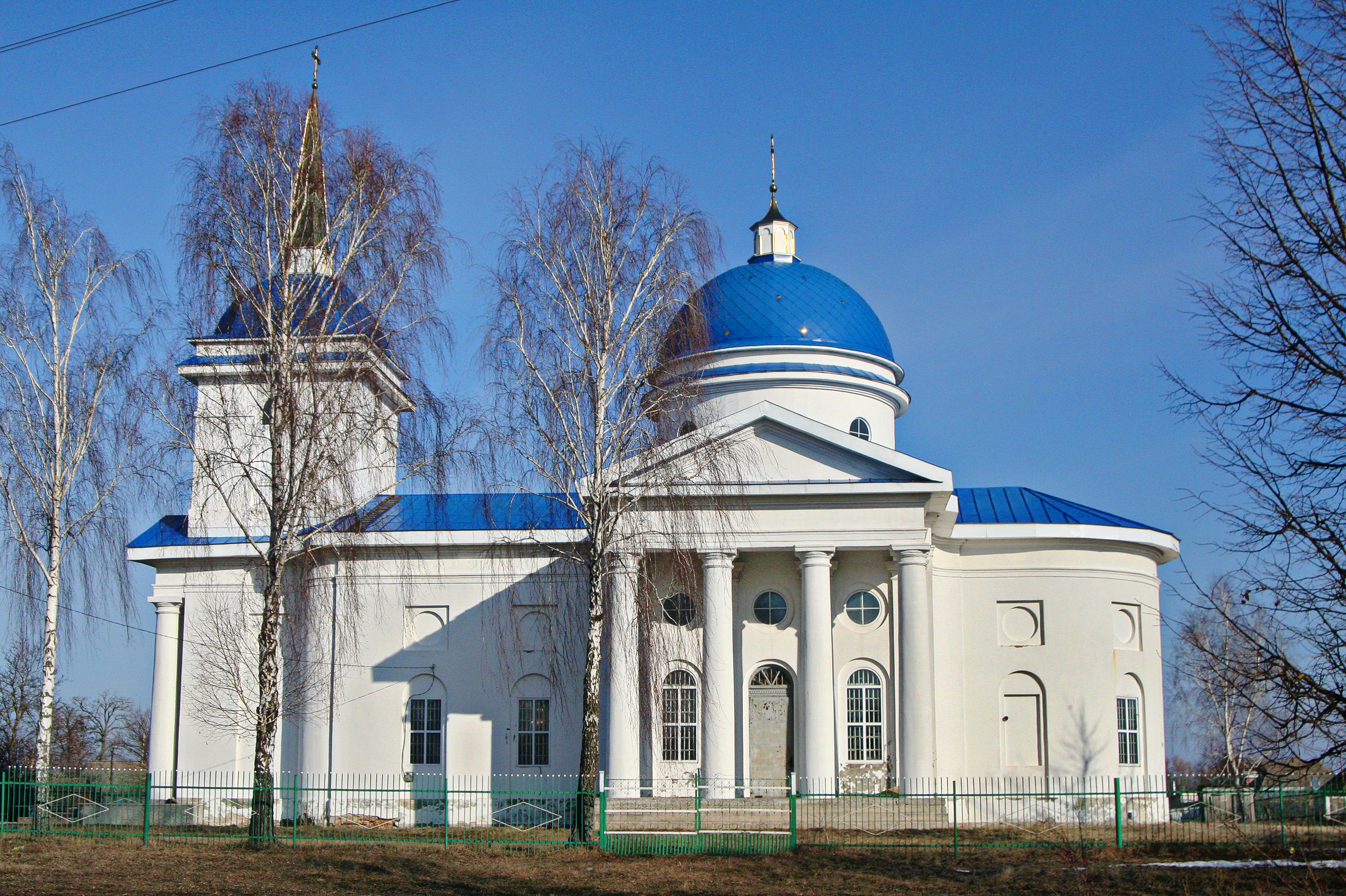 Успенська церква, Новий Биків, Чернігівщина